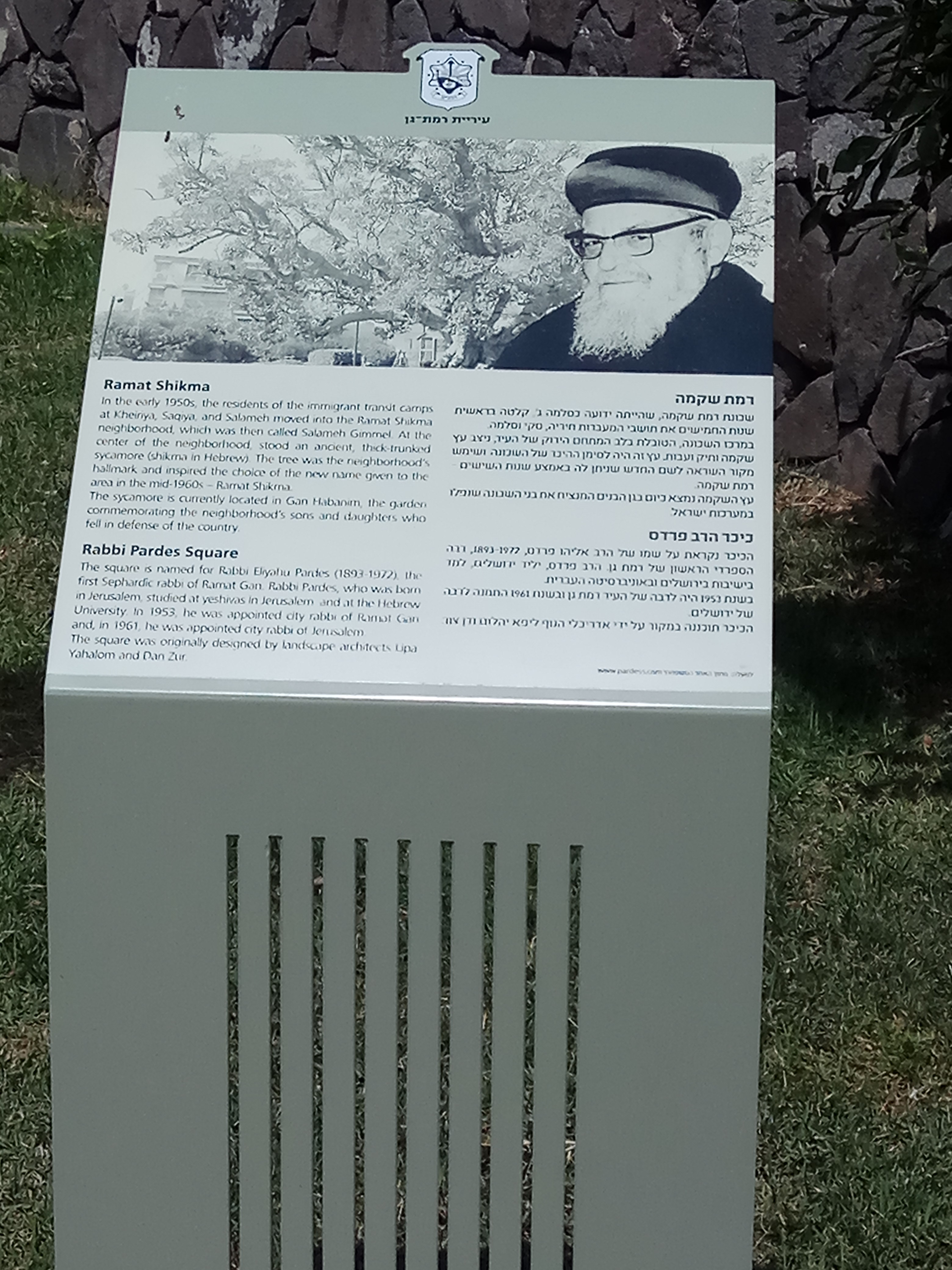 שלט הסבר בכיכר הרב פרדס ברמת השקמה, רמת גן